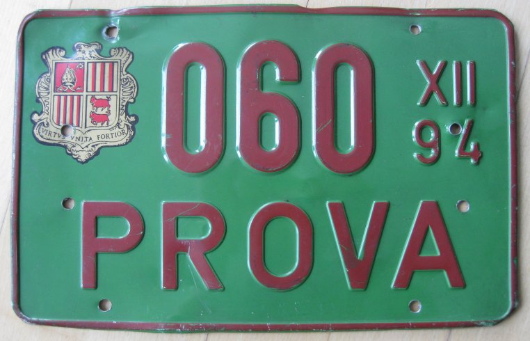 Nummernschild aus Andorra für die Verwendung von Probefahrten aus dem Jahre 1994